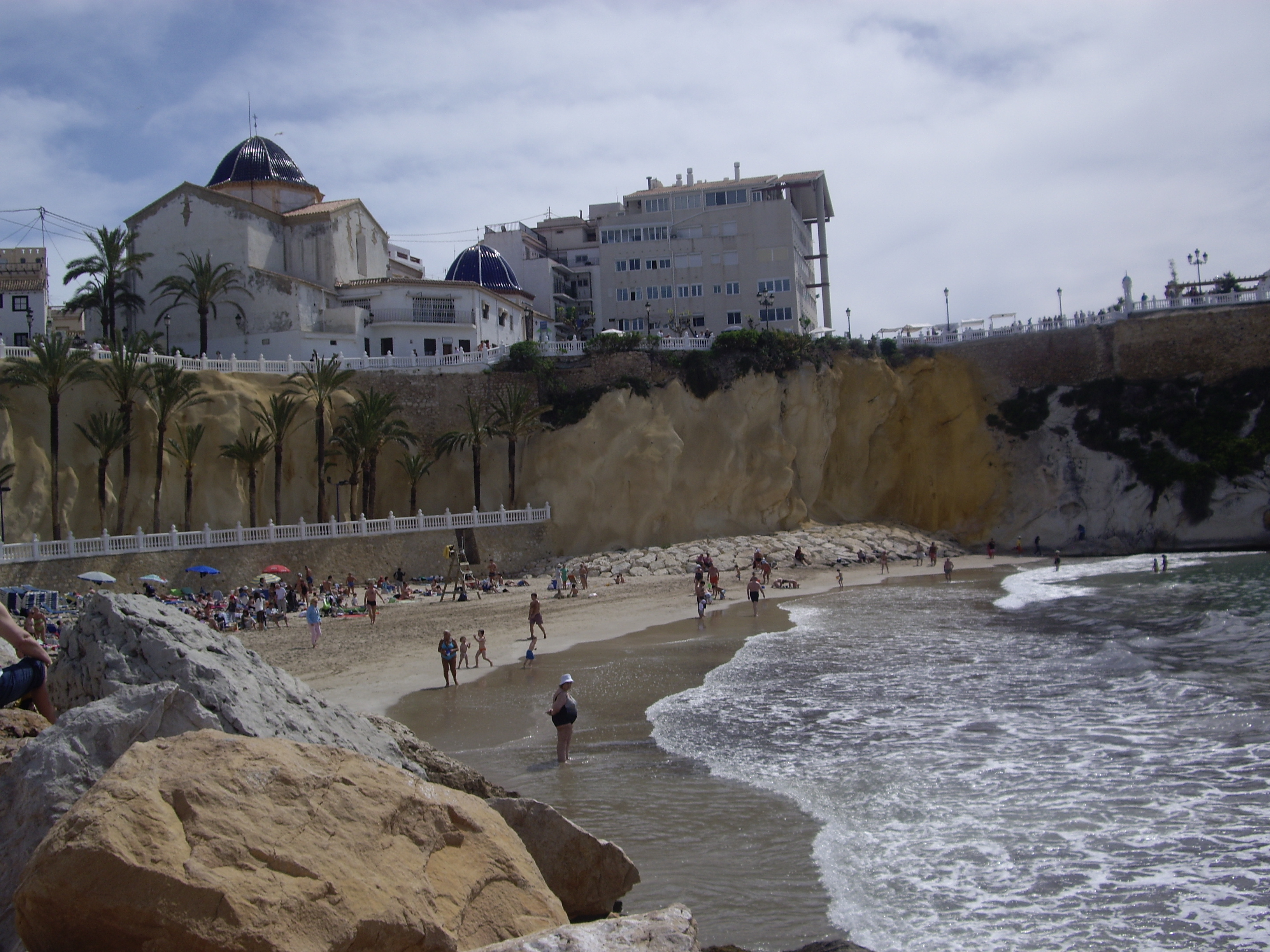 Playa del Mal Pas